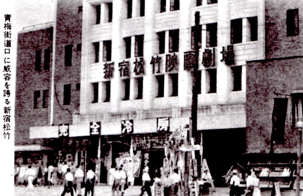 新宿の映画館「新宿松竹」。